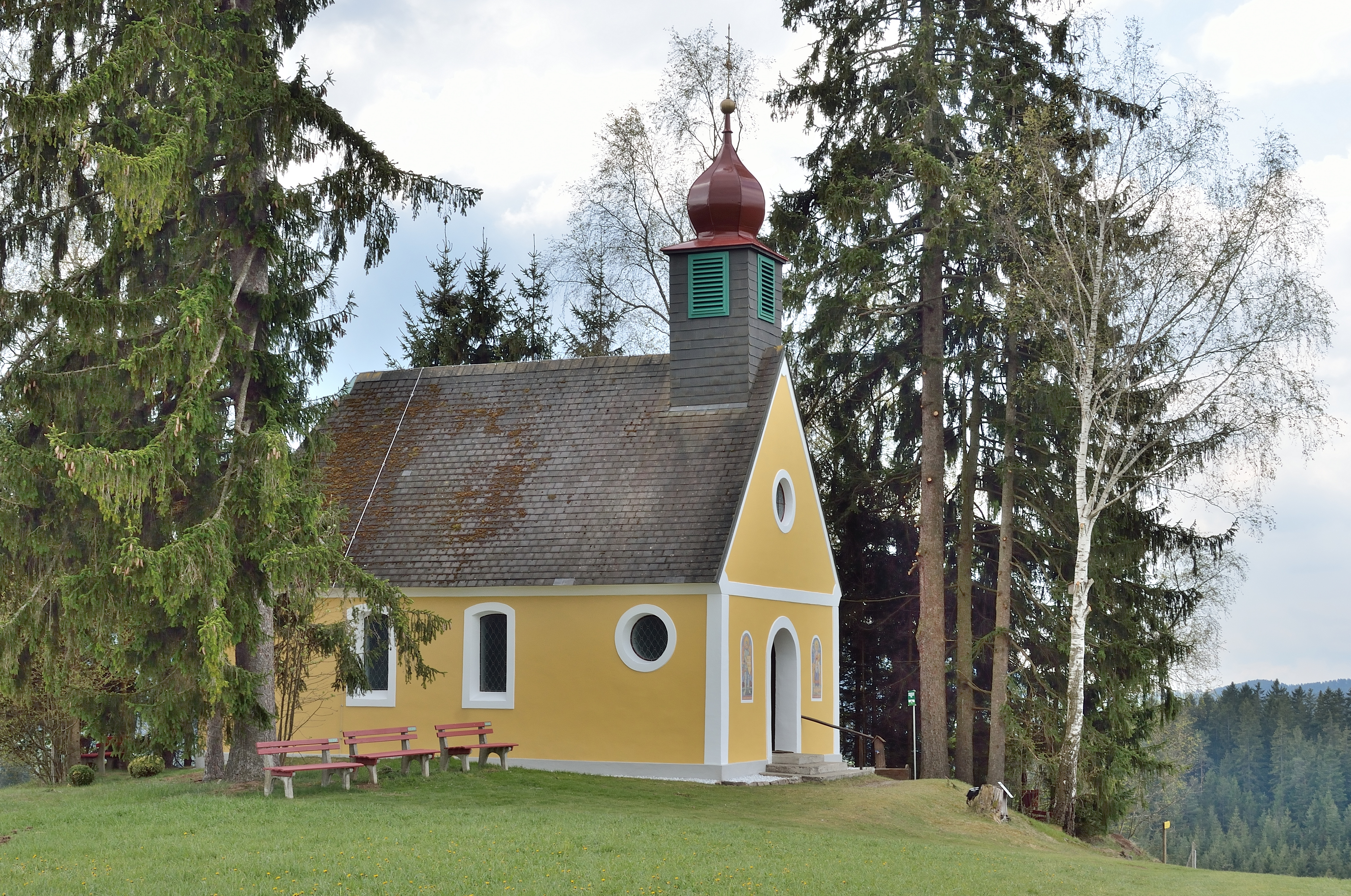 Die Gedächtniskapelle Waisenegg in der ehemaligen Gemeinde Waisenegg wurde 1949 als Friedenskapelle Waisenegg errichtet, und 1981 vom Maler Franz Weiss neu gestaltet. Um die Kapelle befindet sich der geschützte Landschaftsteil Gedächtniskapelle Waisenegg. This media shows the Geschützter Landschaftsteil in Styria with the ID GLT_0319.